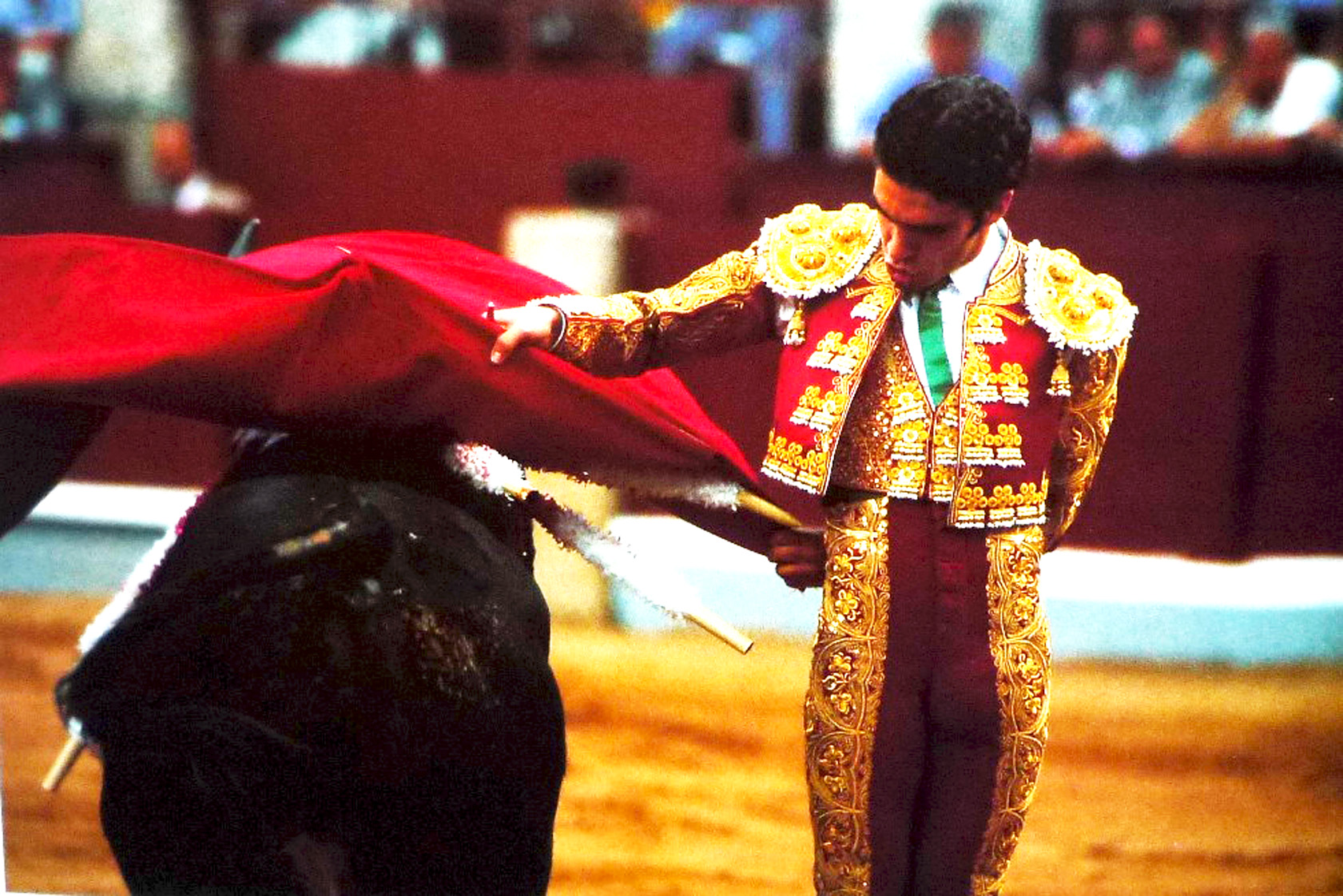 Jose_Tomás_manoletina.JPG